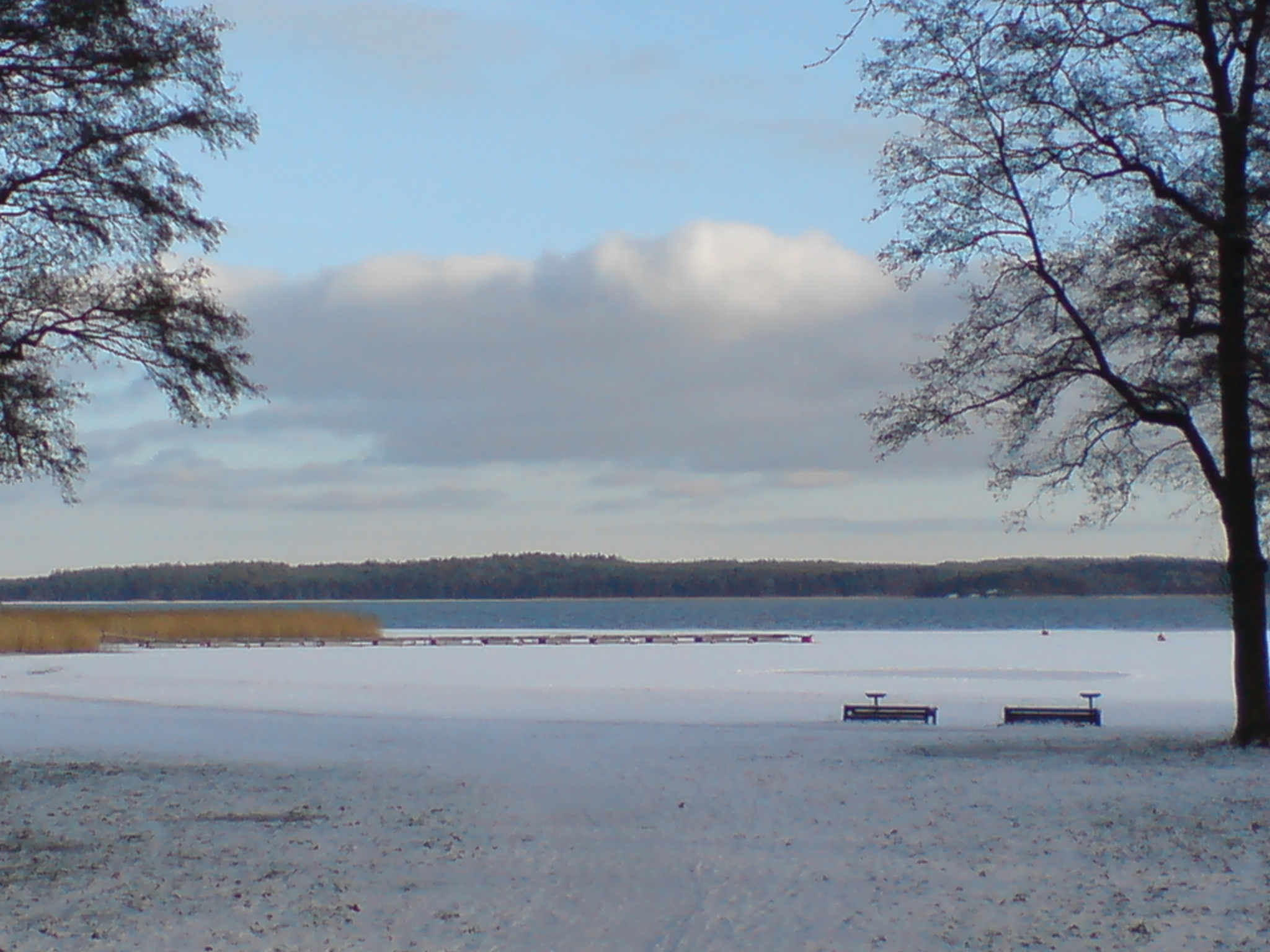 Bogesundslandet och Stora Värtan, sett från Näsa äng i Näsbypark